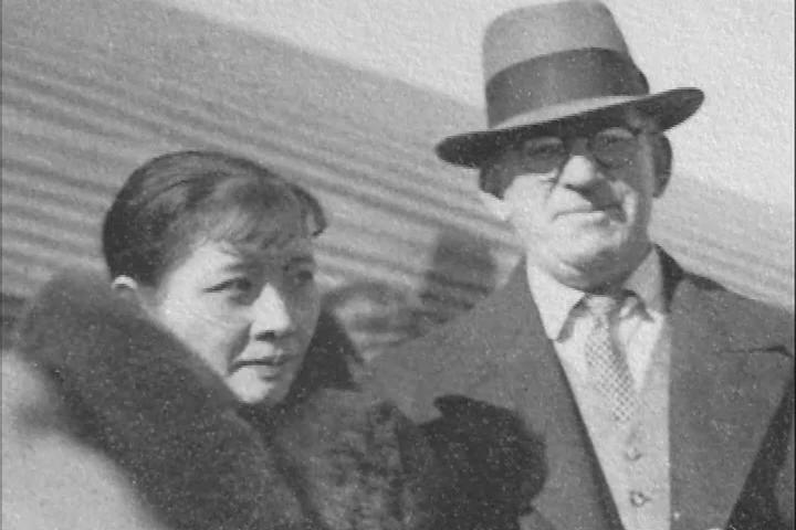 中文（中国大陆）: 1936年12月西安事变时的端纳与宋美龄合影